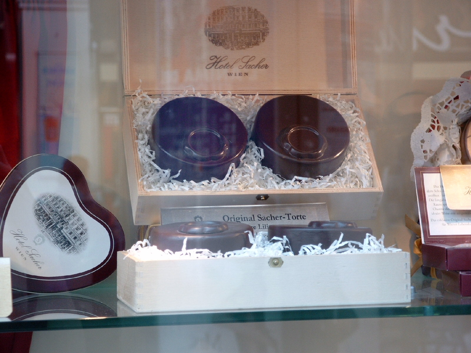 Sachertorte in der Auslage neben dem Hotel Sacher in Wien Kärntnerstraße fotografiert 09 /2005